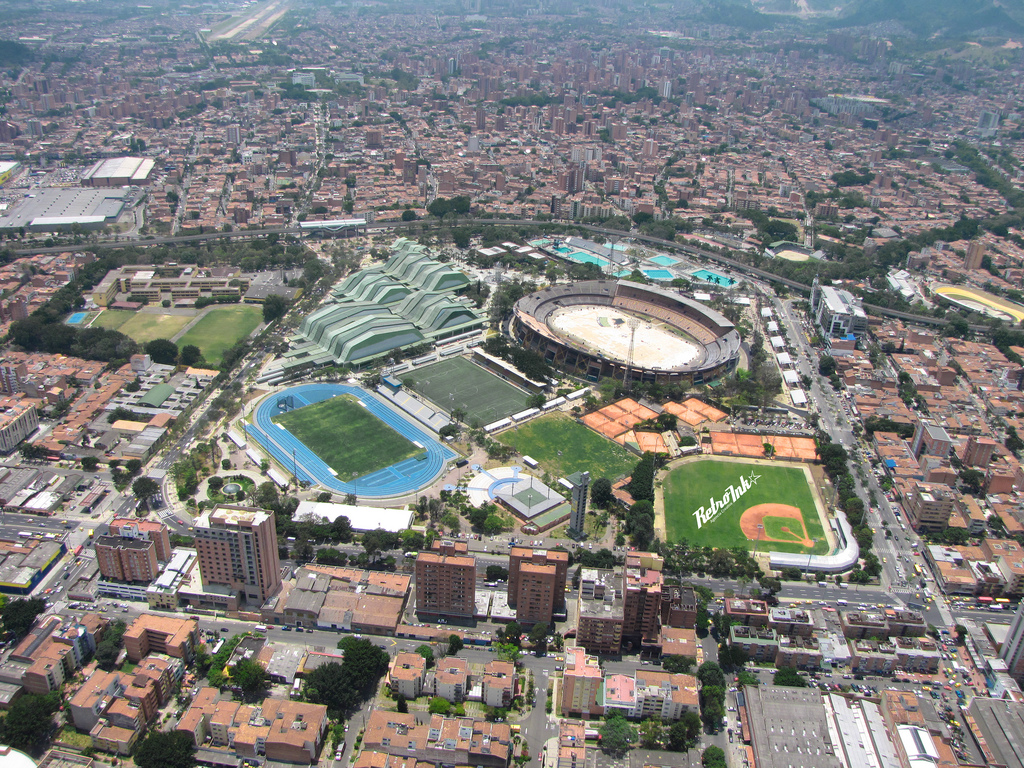 Unidad deportiva Atanasio Girardot - Cuatro días antes de la inauguración de los Juegos Suramericanos en Medellín 2010 - Antioquia - Colombia